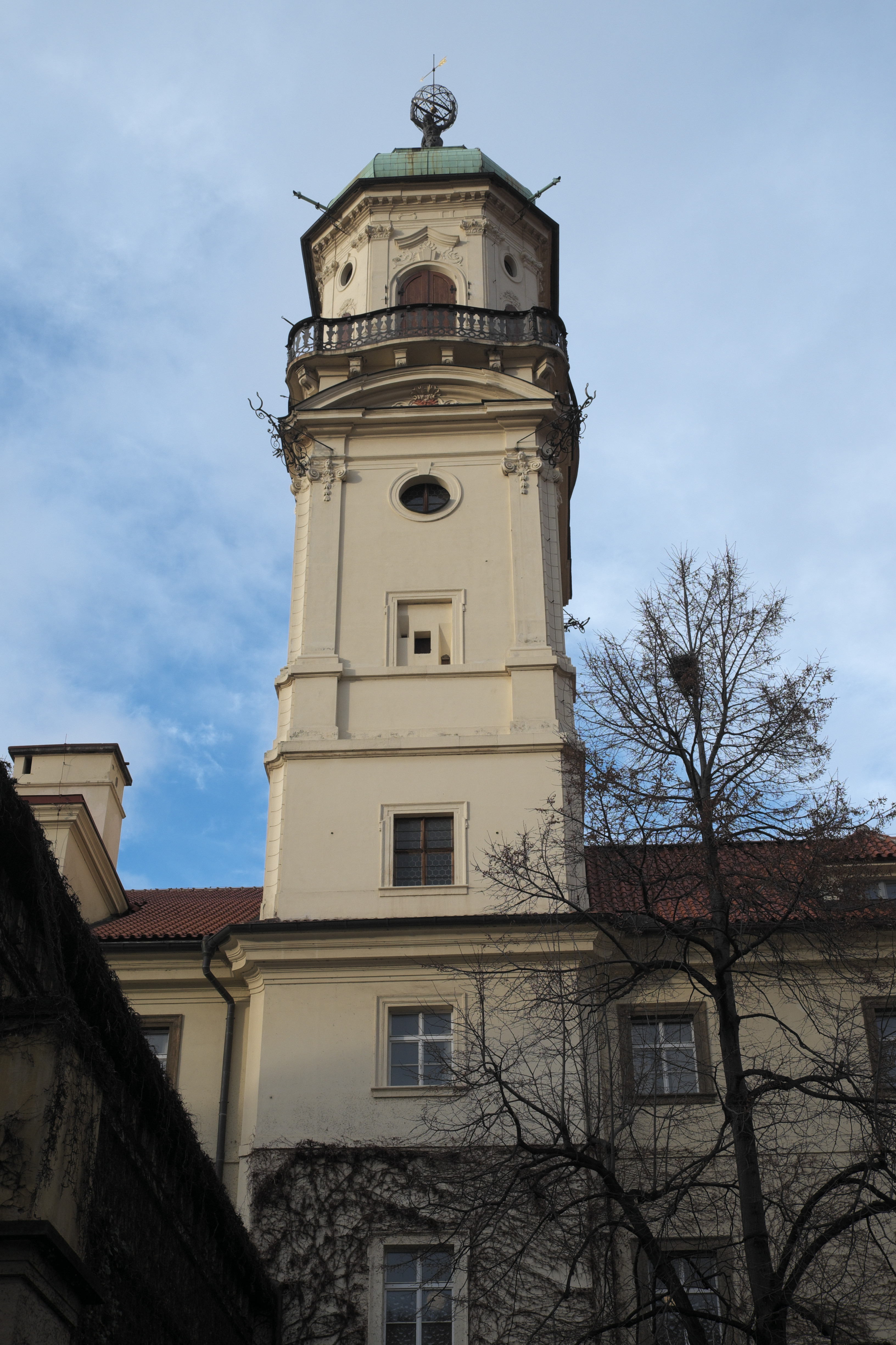 Astronomischer Turm des Clementinums in der Altstadt (Staré Město) in Prag (Tschechien)